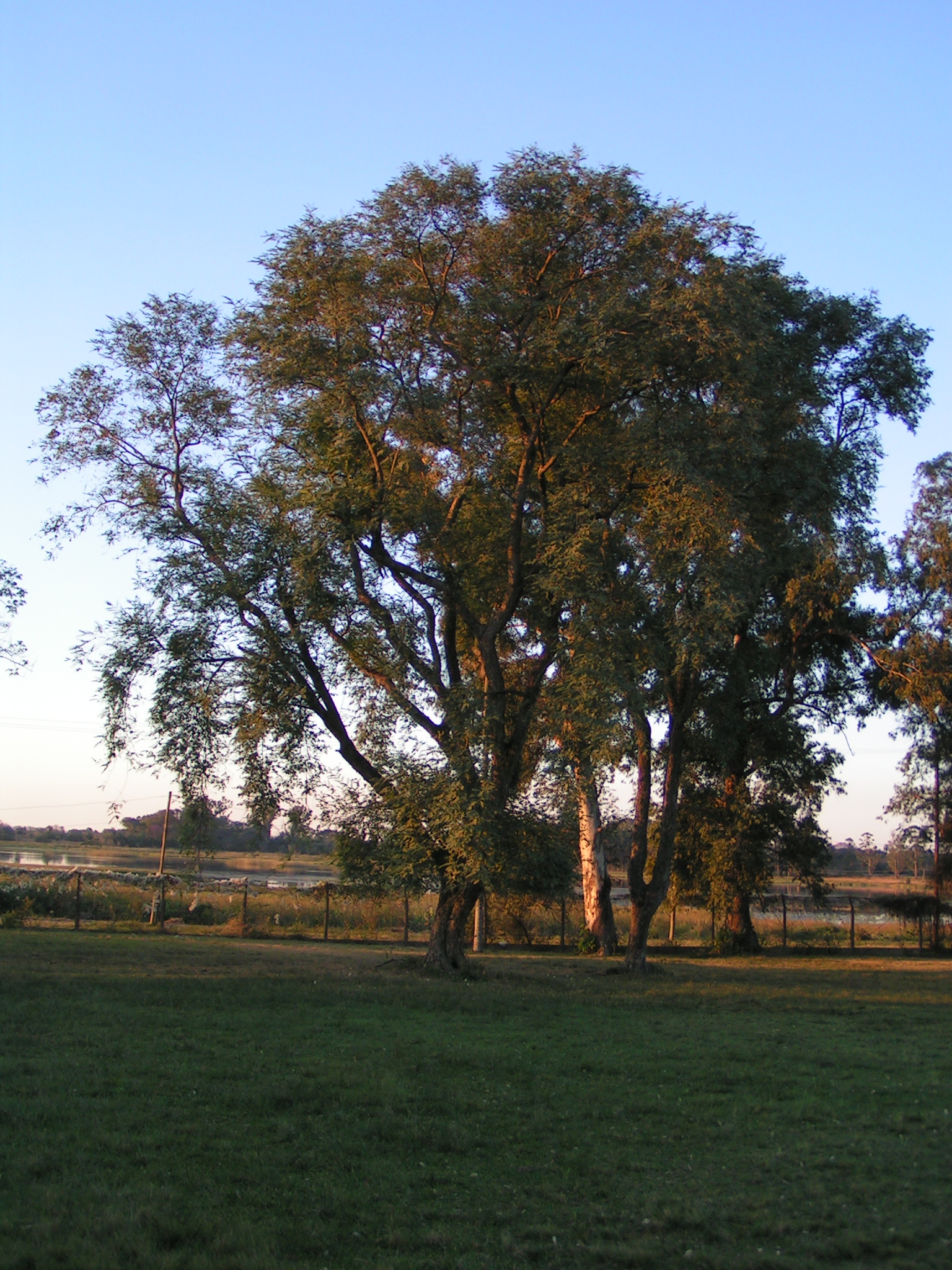 Ejemplar añoso de yvyra pita o ibirá pitá (Peltophorum dubium)